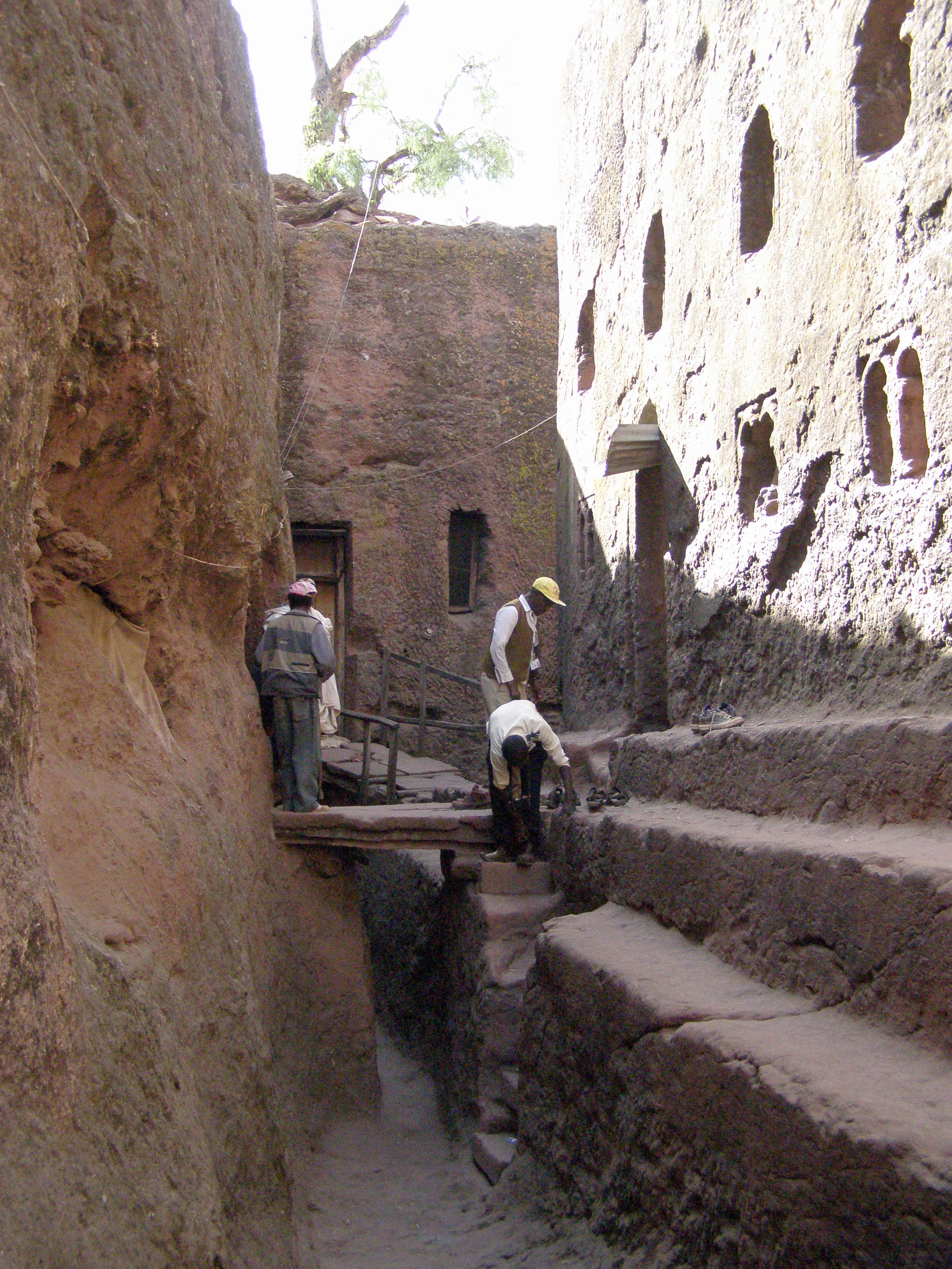 Ethiopie - Eglises rupestres de Lalibela - Façade de Biet Debre Sina